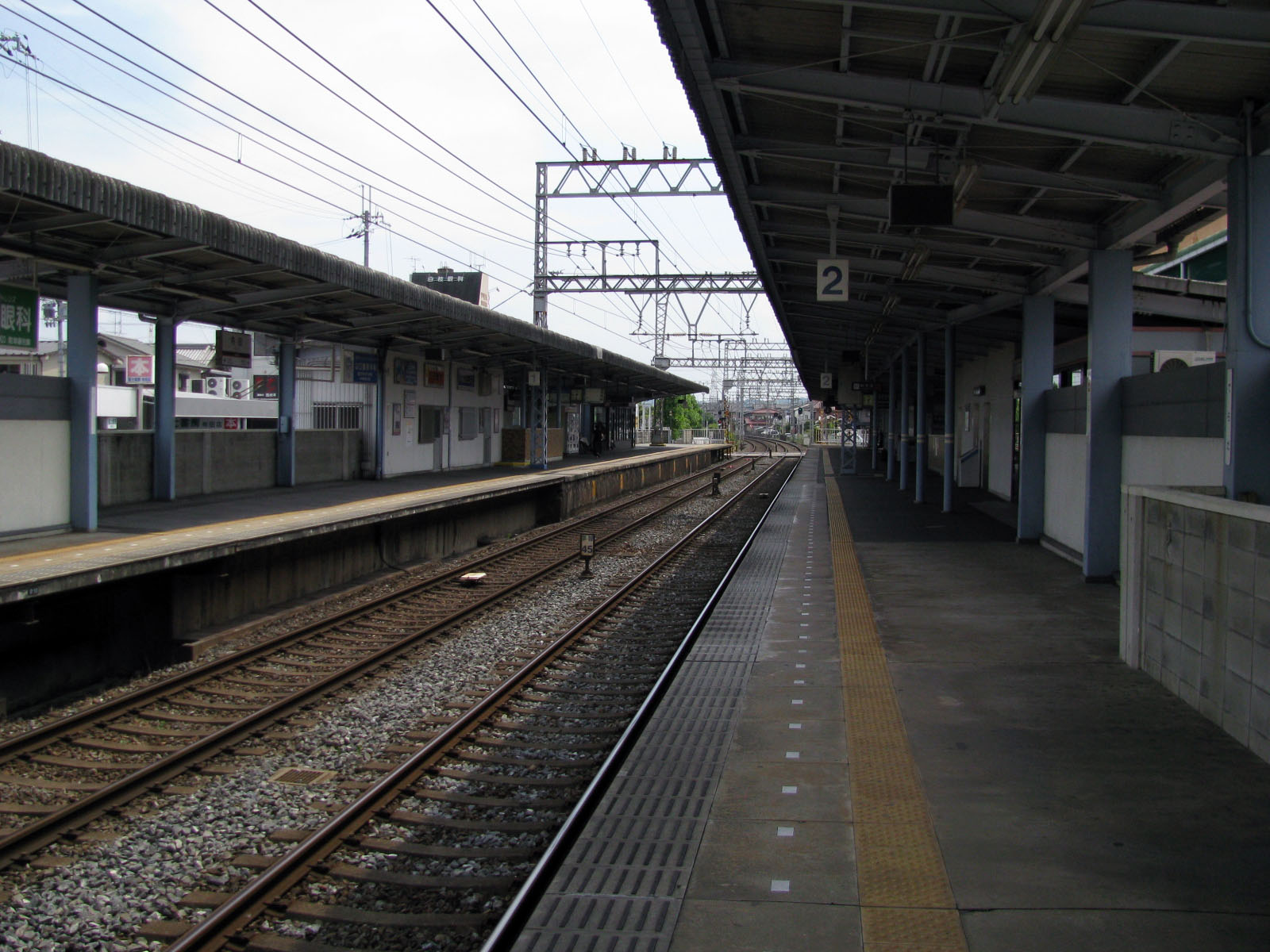 近鉄線寺田駅